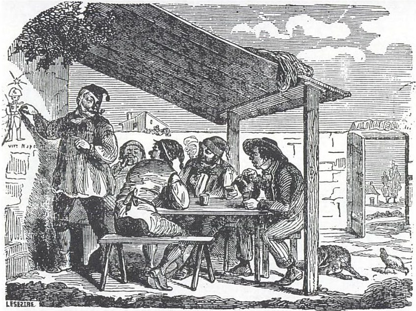 Illustration extraite des grelots de Momus